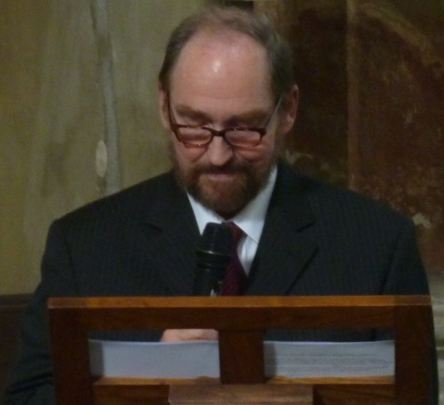 Rudolf Rakouský, vnuk posledního rakouského císaře Karla I., přednáší o své babičce a jeho manželce císařovně Zitě v kostele sv. Janů v Brně dne 15.04.2014